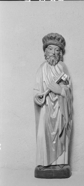 Träskulptur från ett numera försvunnet altarskåp från 1475. S:t Torgils av Kumla. Kategori: (05) SkulpturerTräskulptur från ett numera försvunnet altarskåp från 1475. S:t Torgils av Kumla.